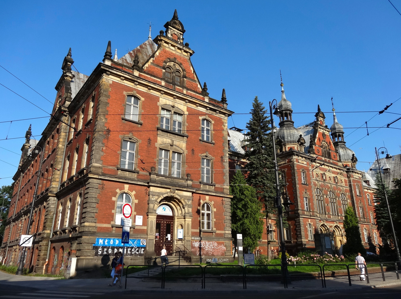 Budynek dawnej dyrekcji Kolei Wschodniej w Bydgoszczy, ul. Dworcowa 63, zbud. 1886-1889, od 2013 r. w gestii Collegium Medicum UMK